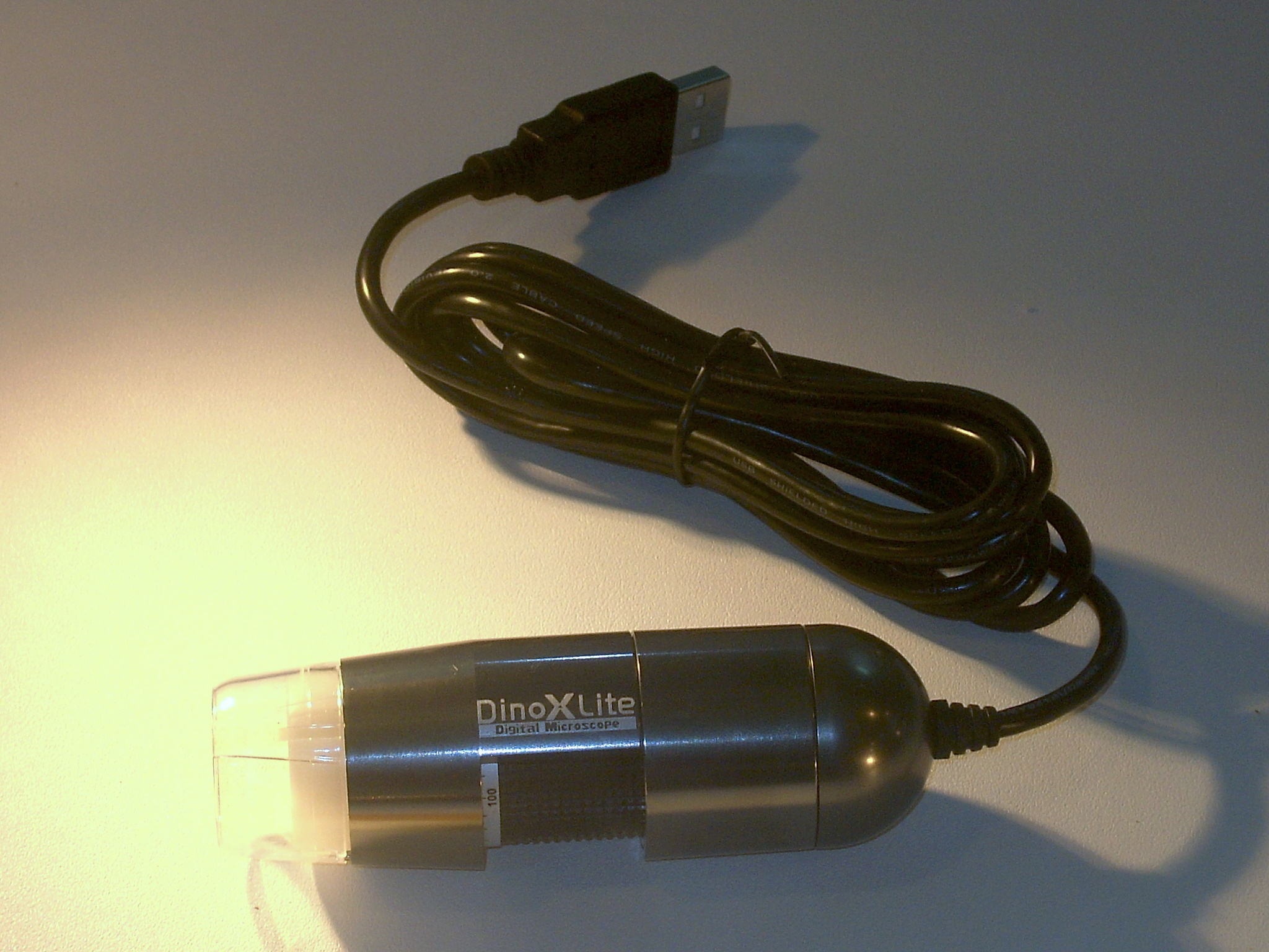 2008 Computex - D & i Award: AnMo Dino-Lite Digital Microscope.